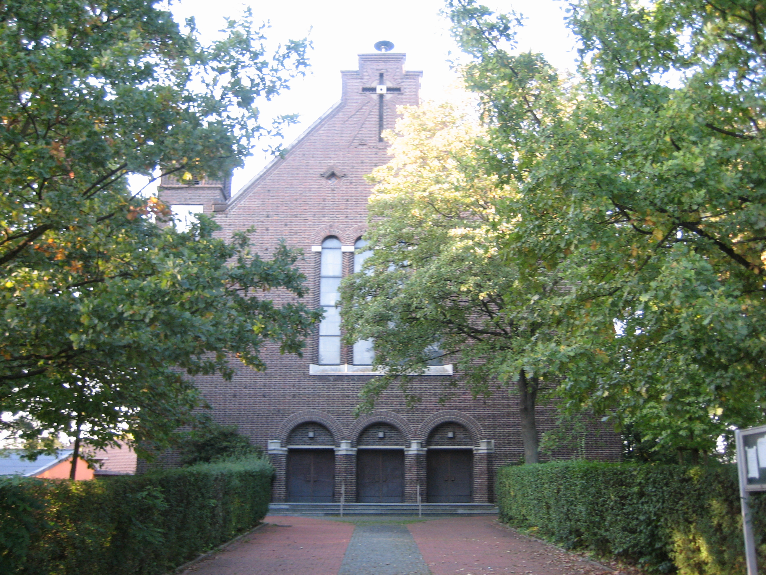 Pfarrkirche Christ-König in Hagen-Boelerheide This is a photograph of an architectural monument.